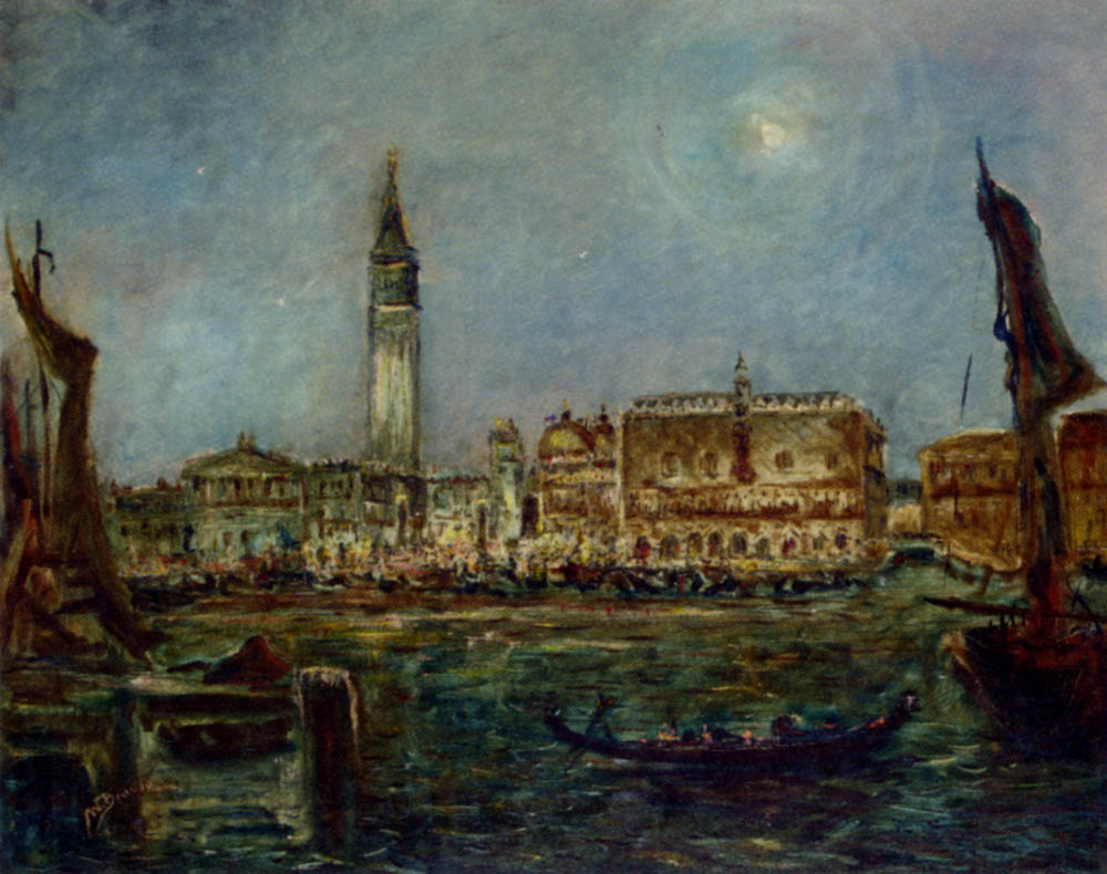 Wenecja - Basen św. Marka